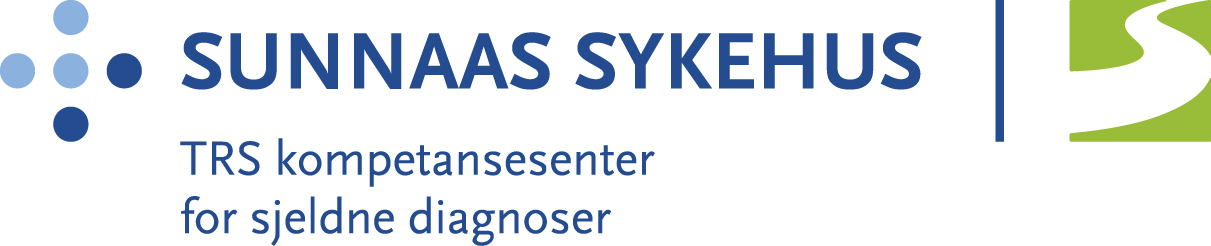 Logo for TRS kompetansesenter